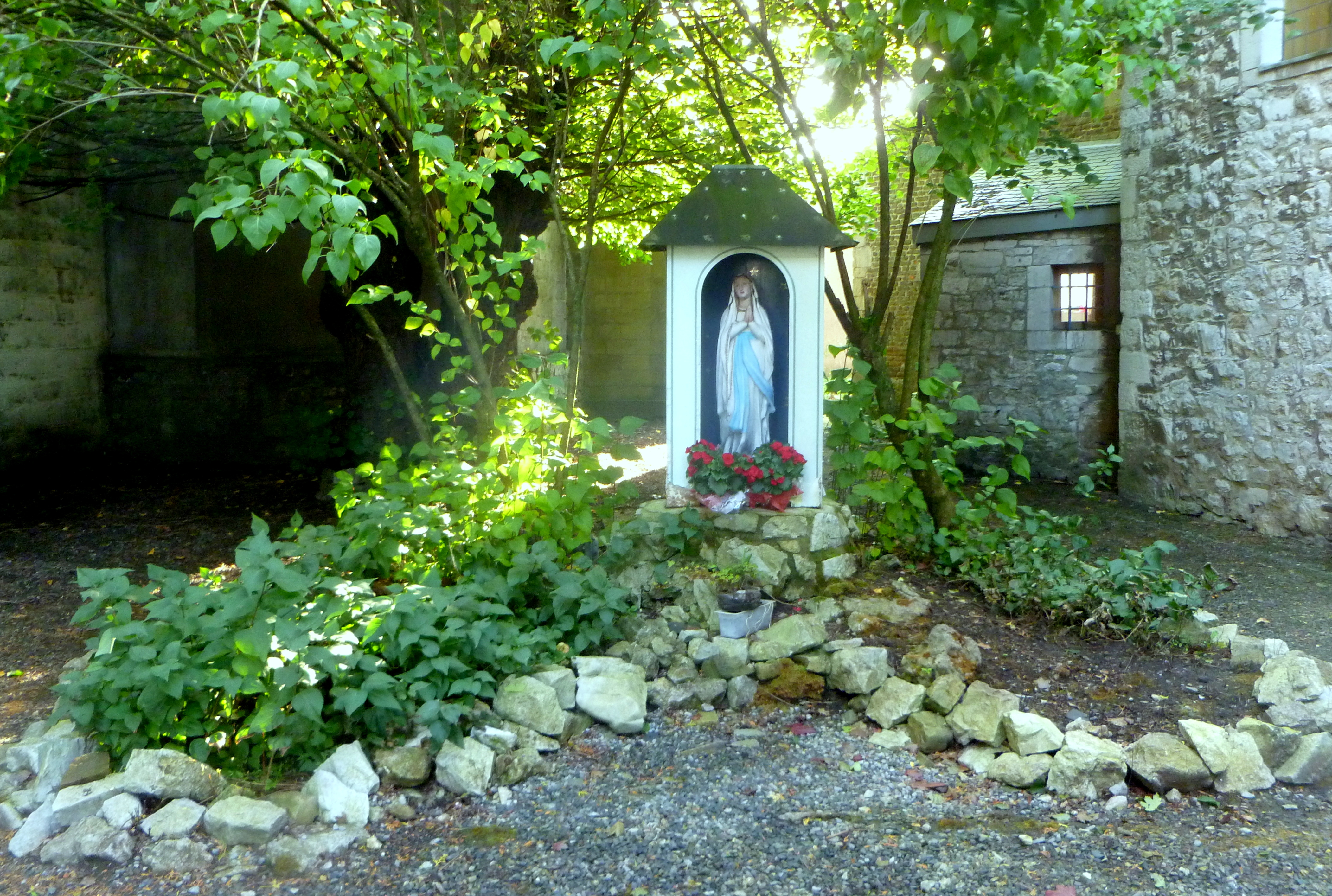 Madonnenfigur im Garten der Werthkapelle in Eupen